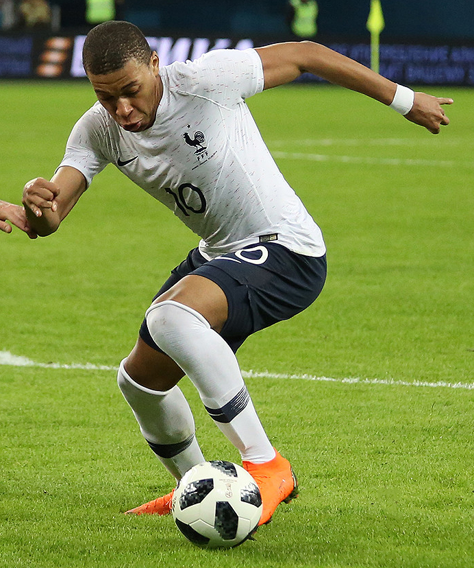 Сборная России проиграла французам